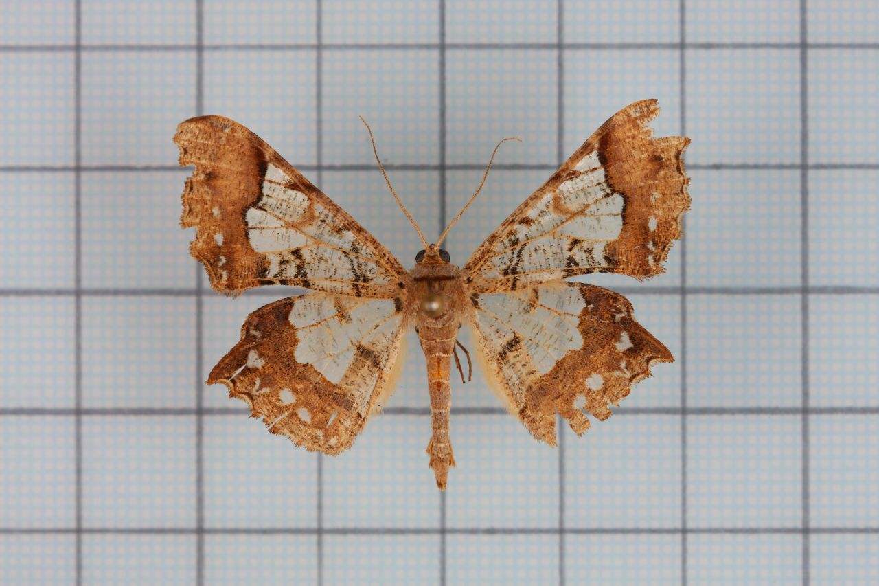 Krananda semihyalina Moore 1867 玻璃尺蛾 鞍1P.22,Pl.4-2 male